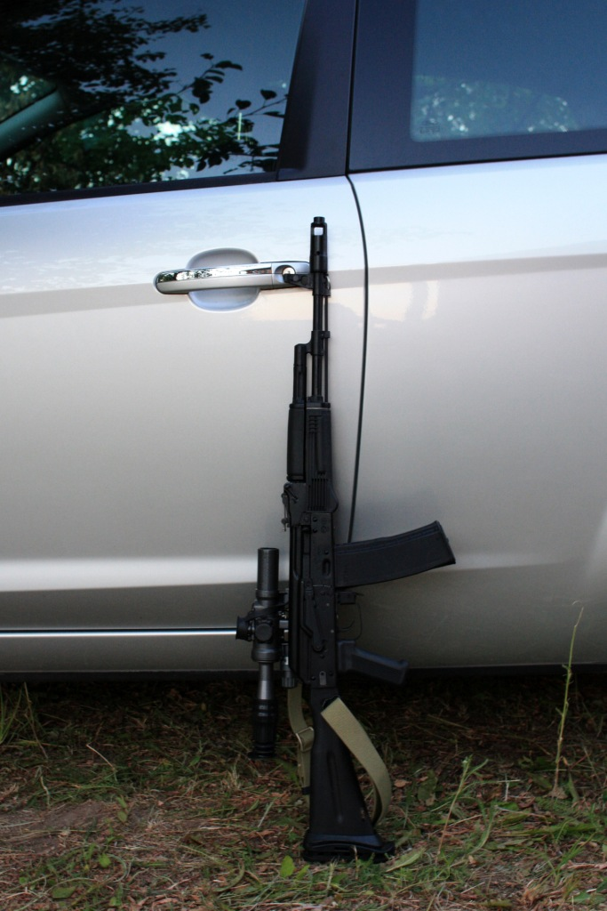 Нарезной карабин "Сайга Мк" с оптическим прицелом ПО 4*24